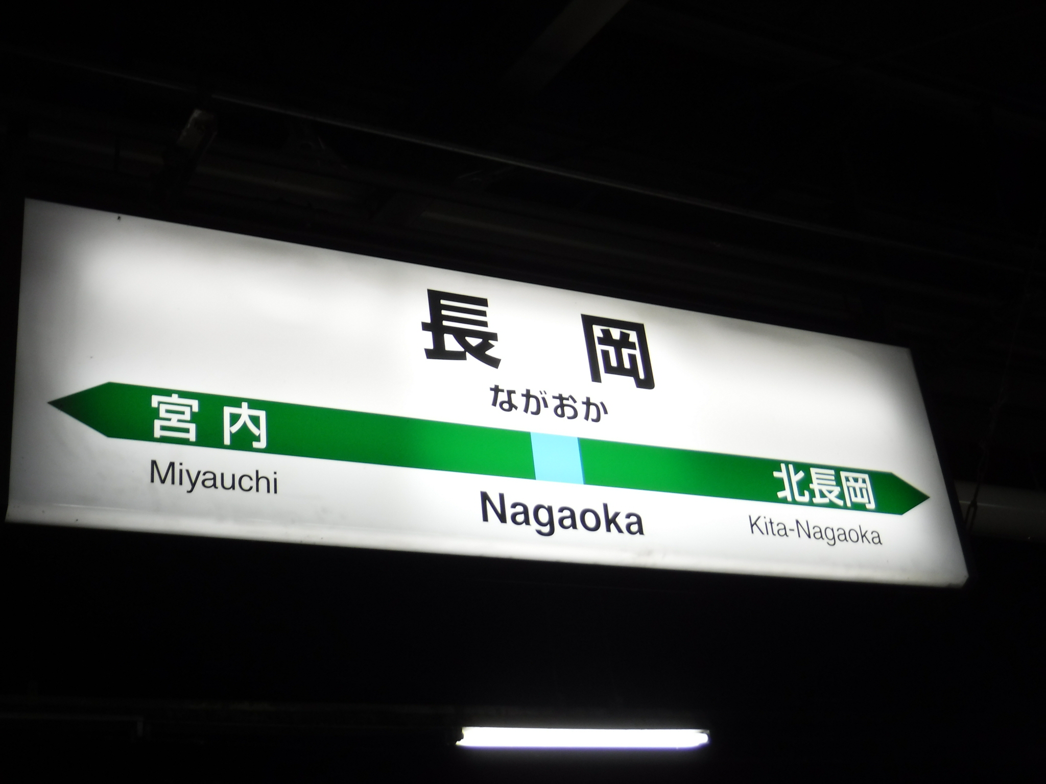 長岡駅の駅名標です。